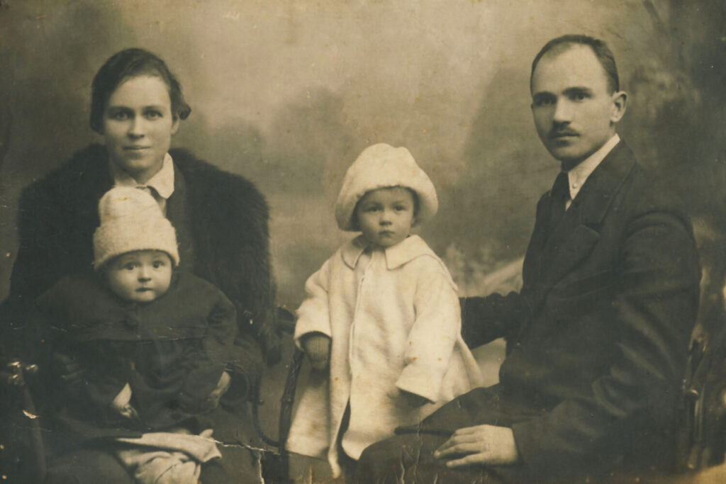 Беларуская (тарашкевіца): М. Гарэцкі з жонкай Леанілай, дзецьмі Галінай і Леанідам.